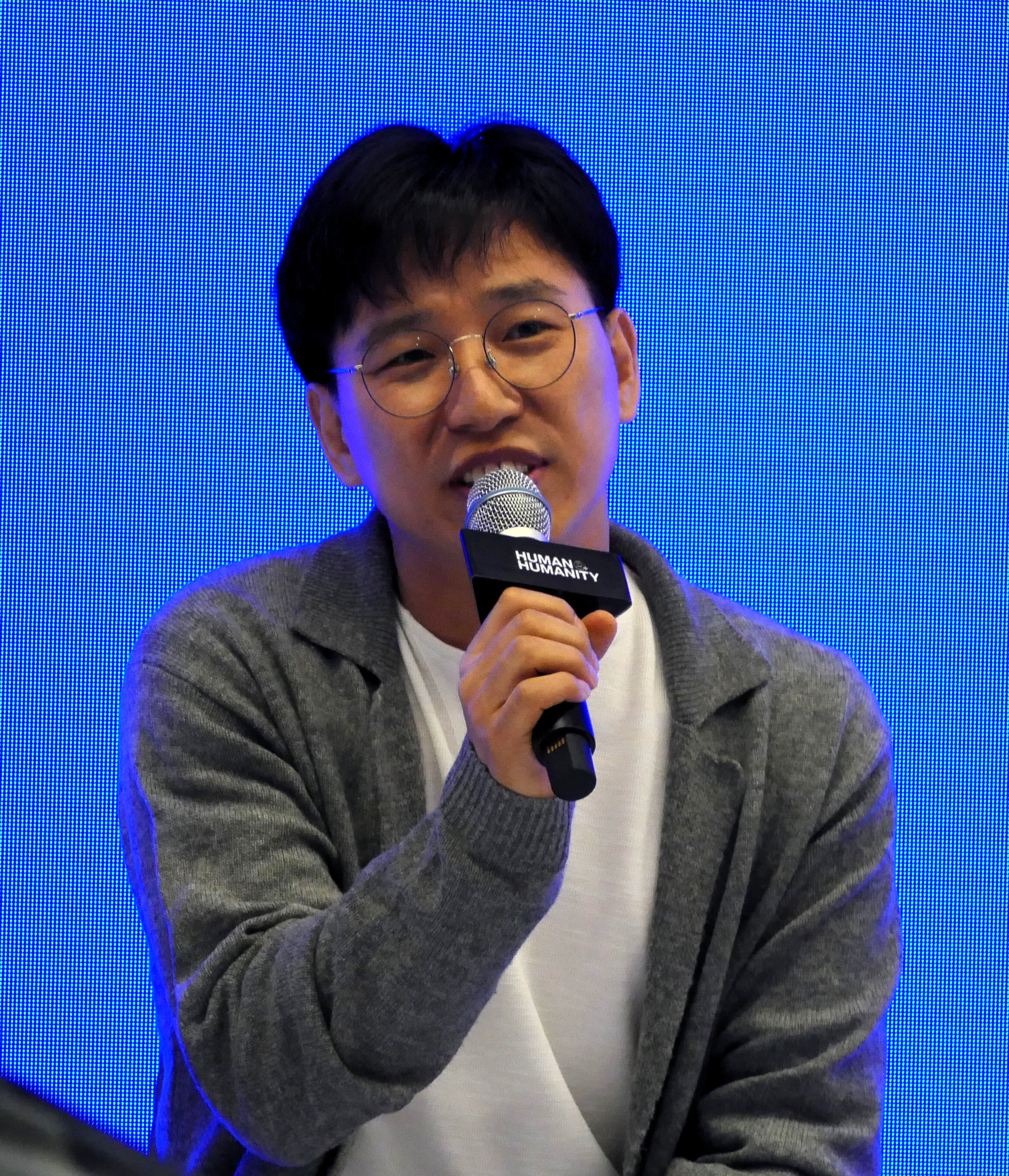 Shin Yong-mok på Bokmässan i Göteborg 2019.